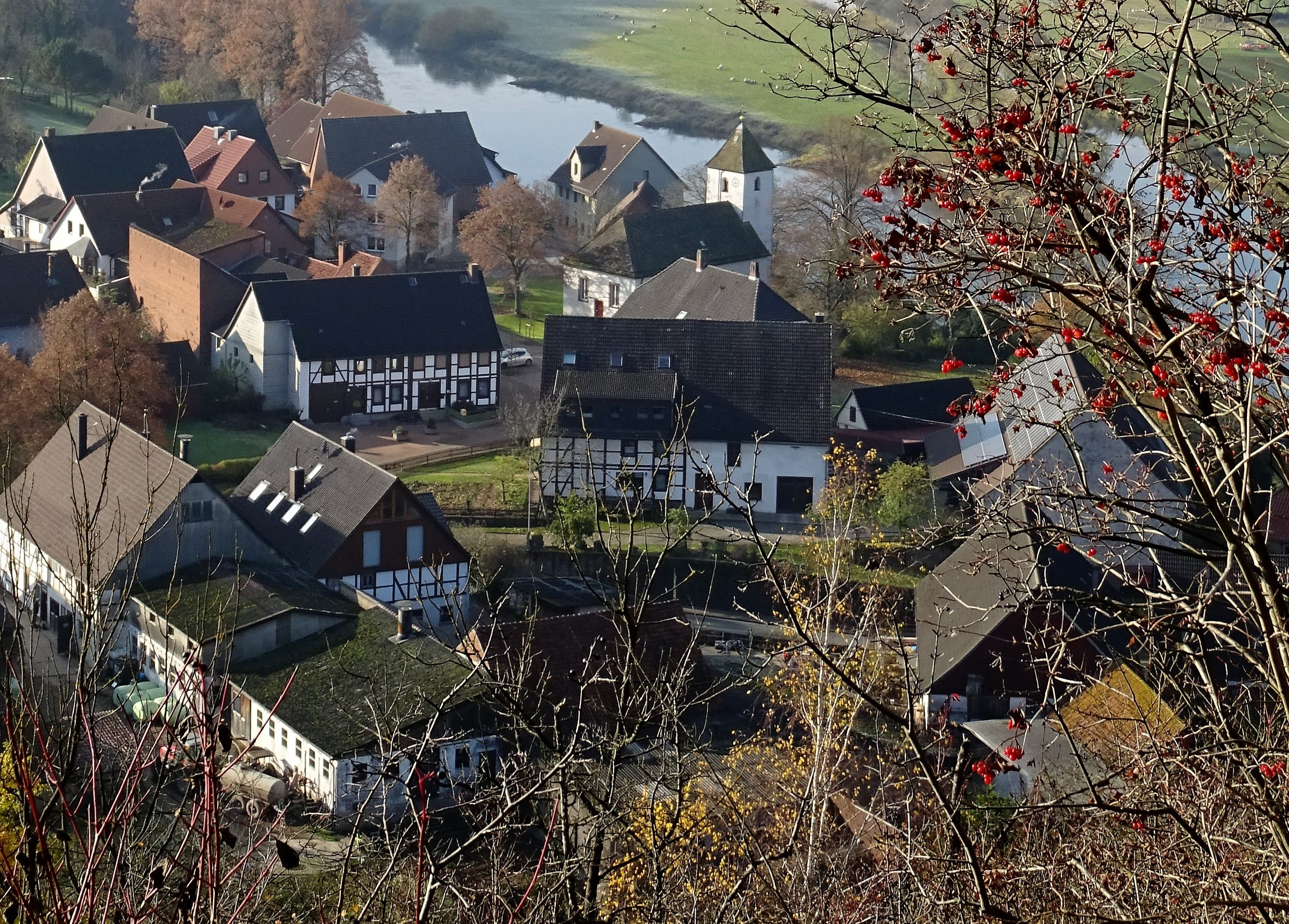 Blick vom Weinberg bei Rühle (NSG HA 107) über Rühle an der Weser